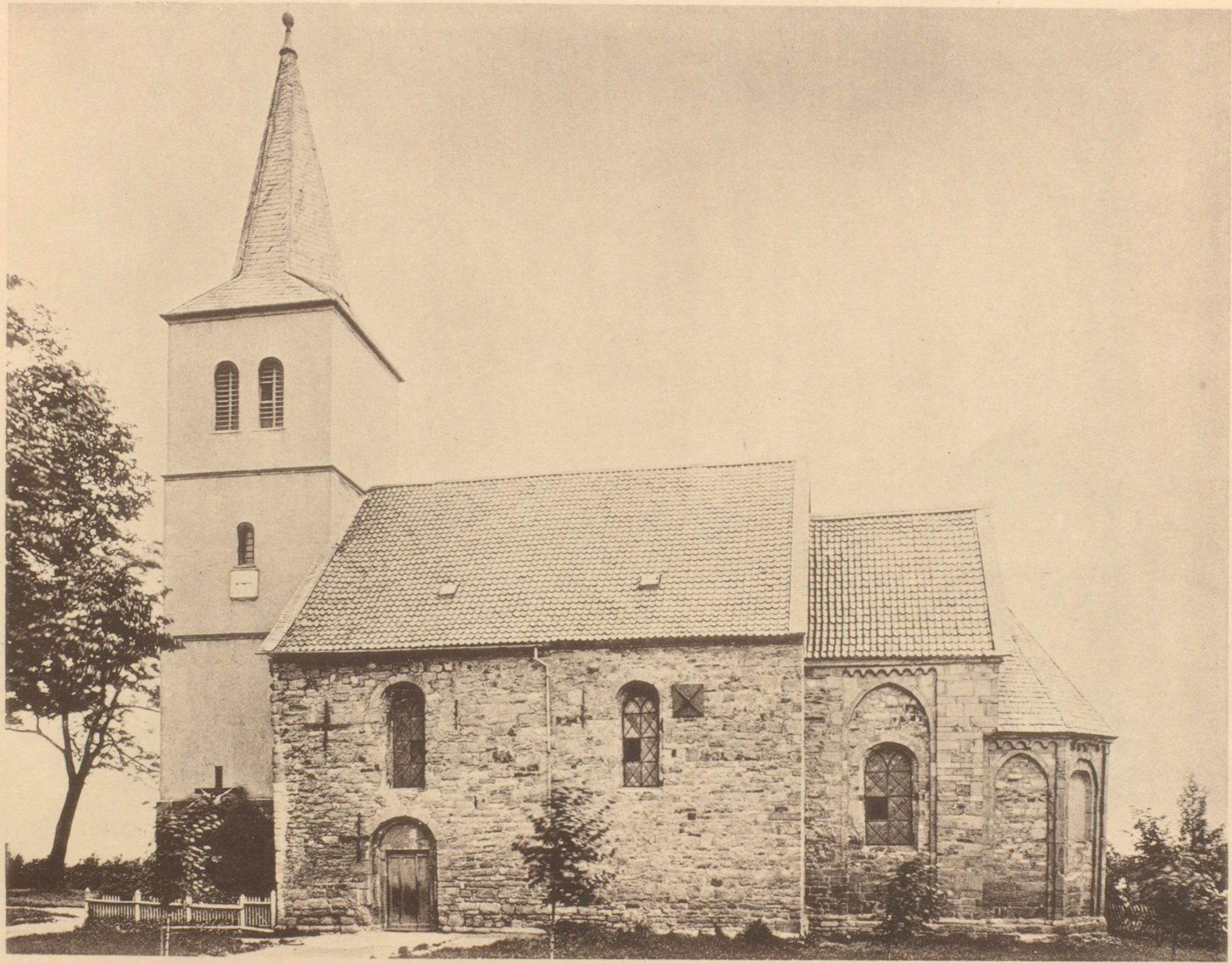 Die Josefskirche in Kirchlinde vor dem Umbau im Jahr 1890.